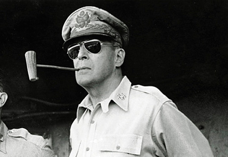 Óculos de sol piloto